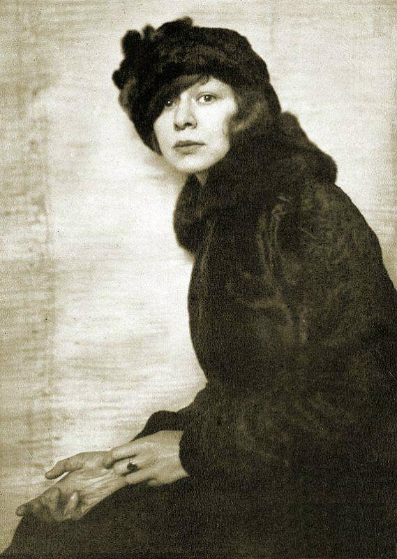 Portrait der Puppenkünstlerin, Kostümbildnerin und Zeichnerin Lotte Pritzel. Foto von Hanns Holdt, 1916